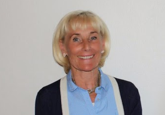 Colette Brix, maj 2014. Folketingskandidat for Venstre i Valby-kredsen.